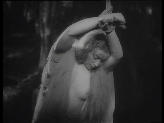 Screenshot del film La corona di ferro (1941) di Alessandro Blasetti.